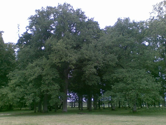 Pürksi mõisa park.